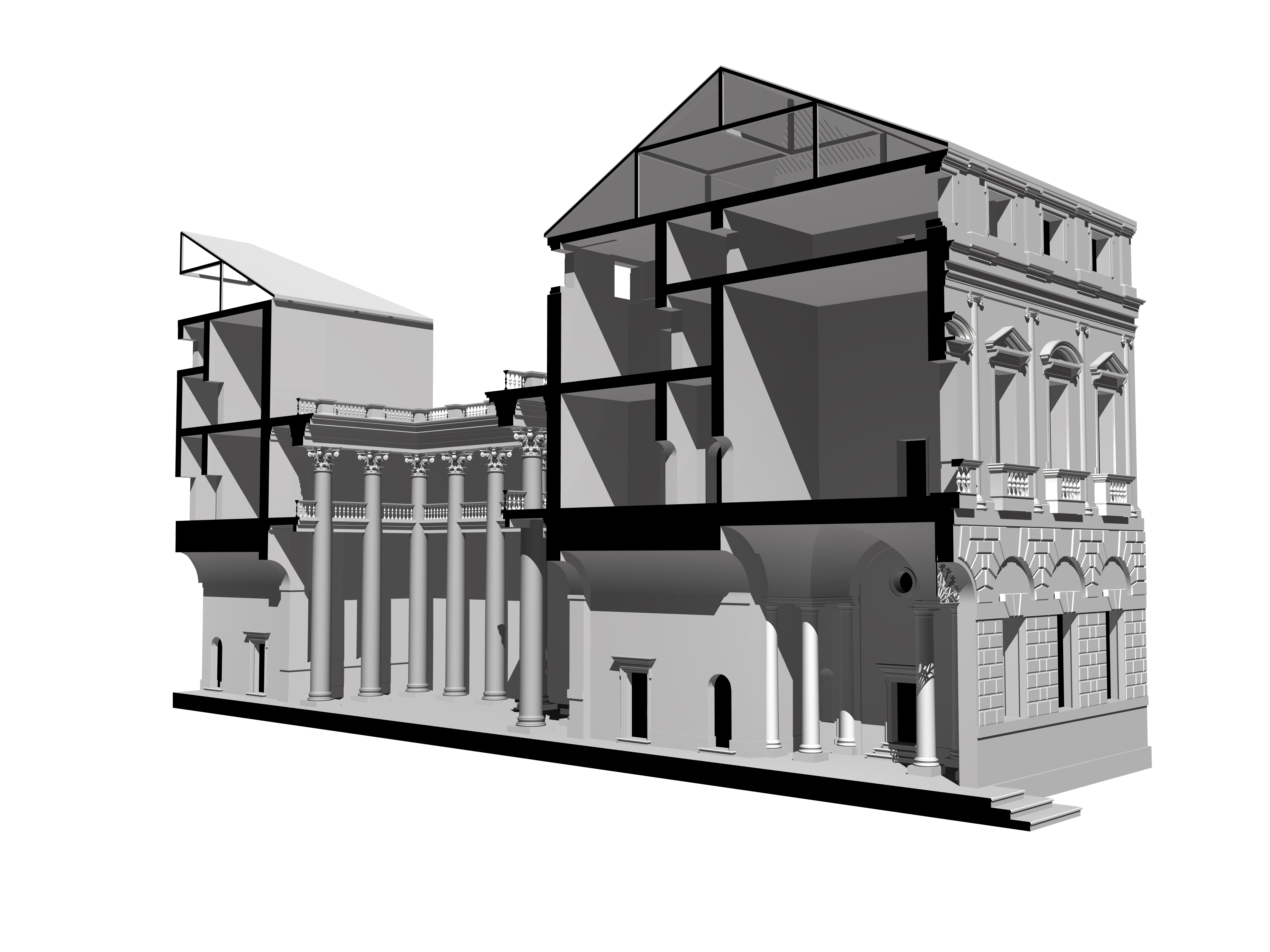 Render della ricostruzione di Palazzo Porto (ora Festa) a Vicenza, di A. Palladio, fatte in base alle tavole presenti su "I Quattro libri dell'architettura" dell'omonimo autore, e su E. Forssman, "Palazzo di Porto Festa a Vicenza", C.I.S.A. Palladio, Vicenza 1973